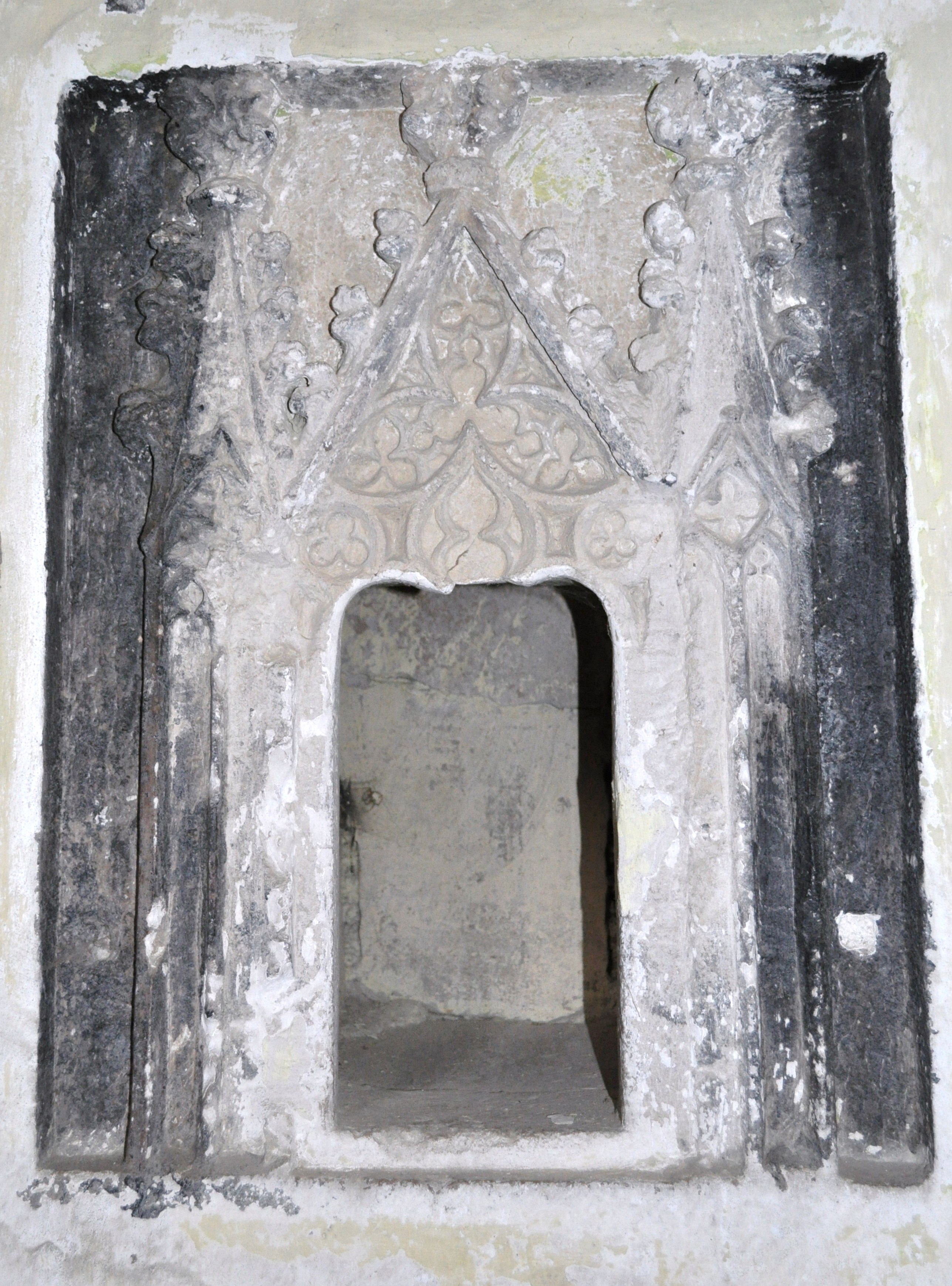 Ansamblul bisericii evanghelice fortificate, sat CURCIU; comuna DÂRLOS